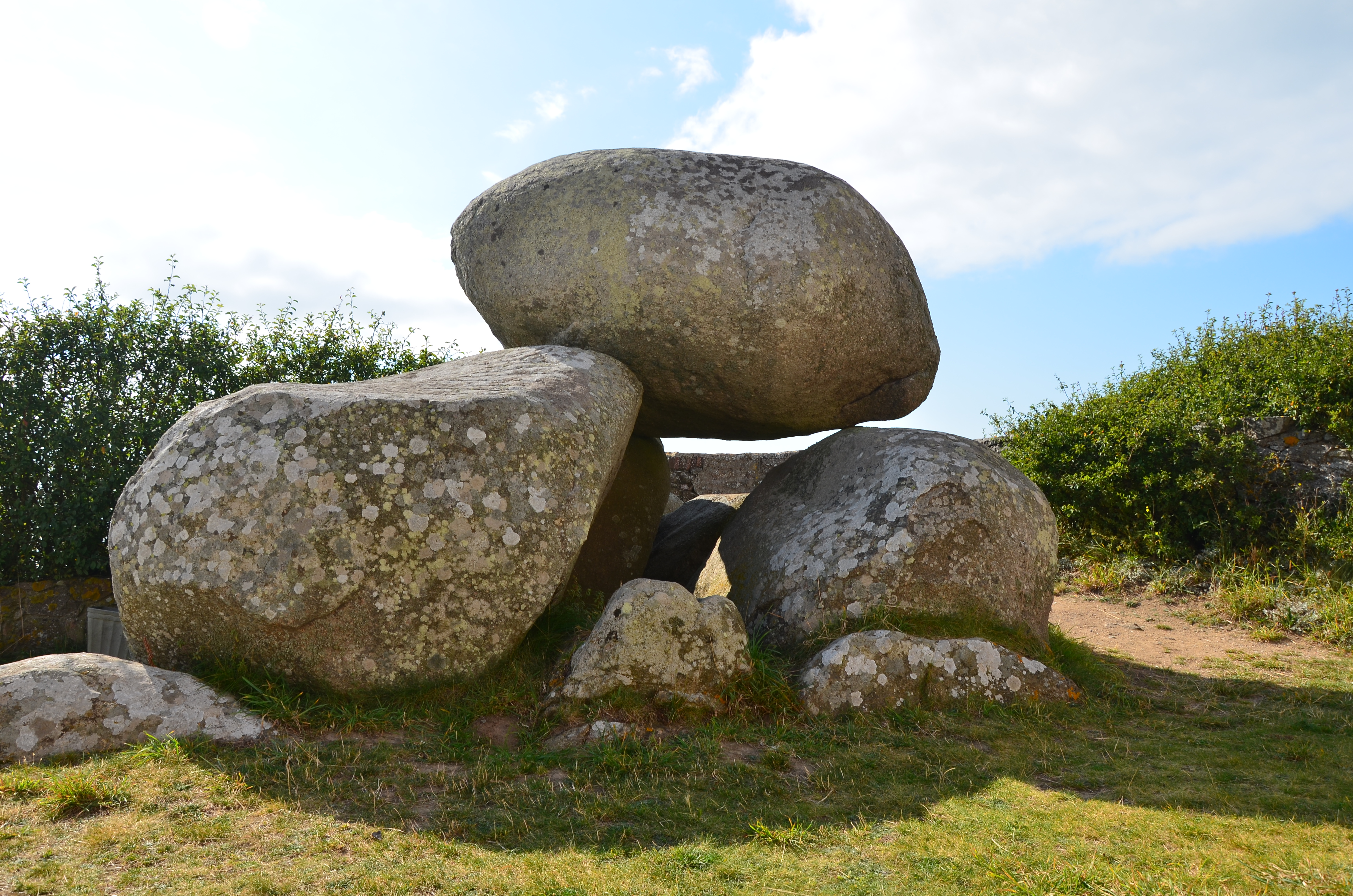 Dolmen dit La Pierre au Rey ou le Trepied .